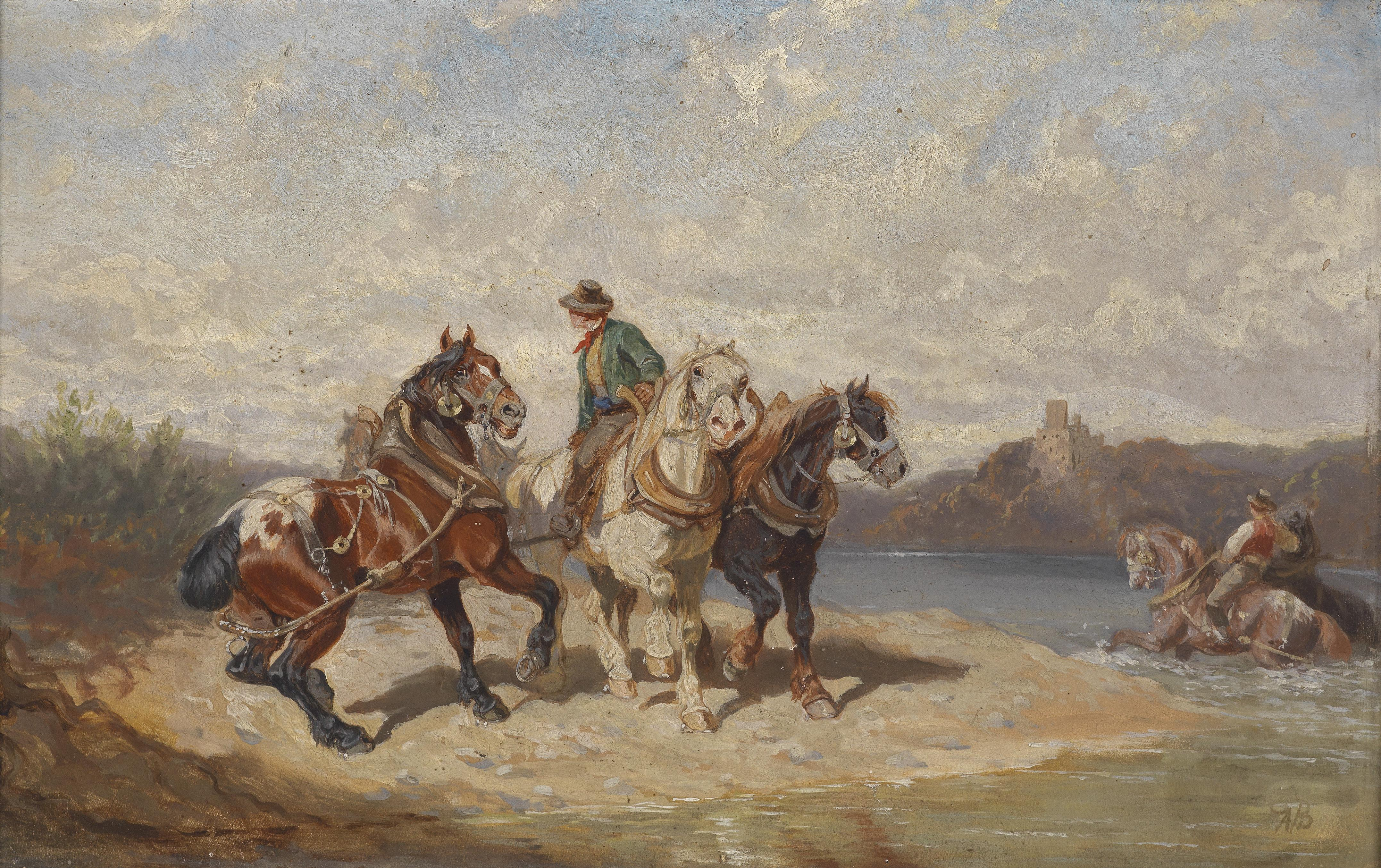 Treidelpferde an der Donau